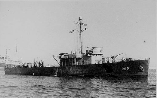 אח"י נגה (ק-26) שירתה זמן קצר בחיל הים